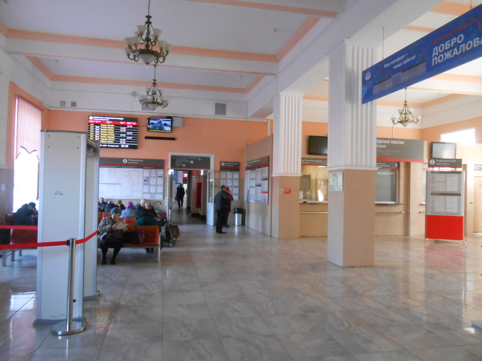 Интерьер вокзала Рязань-1